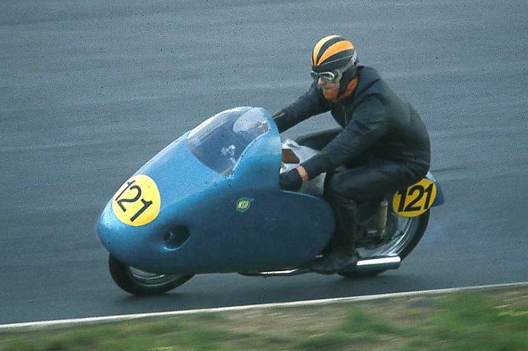 NSU Rennmax, Baujahr 1954, mit Blauwalverkleidung beim Oldtimer-Grand-Prix auf dem Nürburgring; Fahrer: Dieter Herz (* 30.04.1940, † 08.04.2004), Sohn des Renn- und Rekordfahrers Wilhelm HerzDaten des Motorrades: 2-Zylinder-Viertaktmotor, 247 cm³, 2 obenliegende Nockenwellen, Königswelle, 39 PS bei 11.500/min; Höchstgeschwindigkeit 185–200 km/h